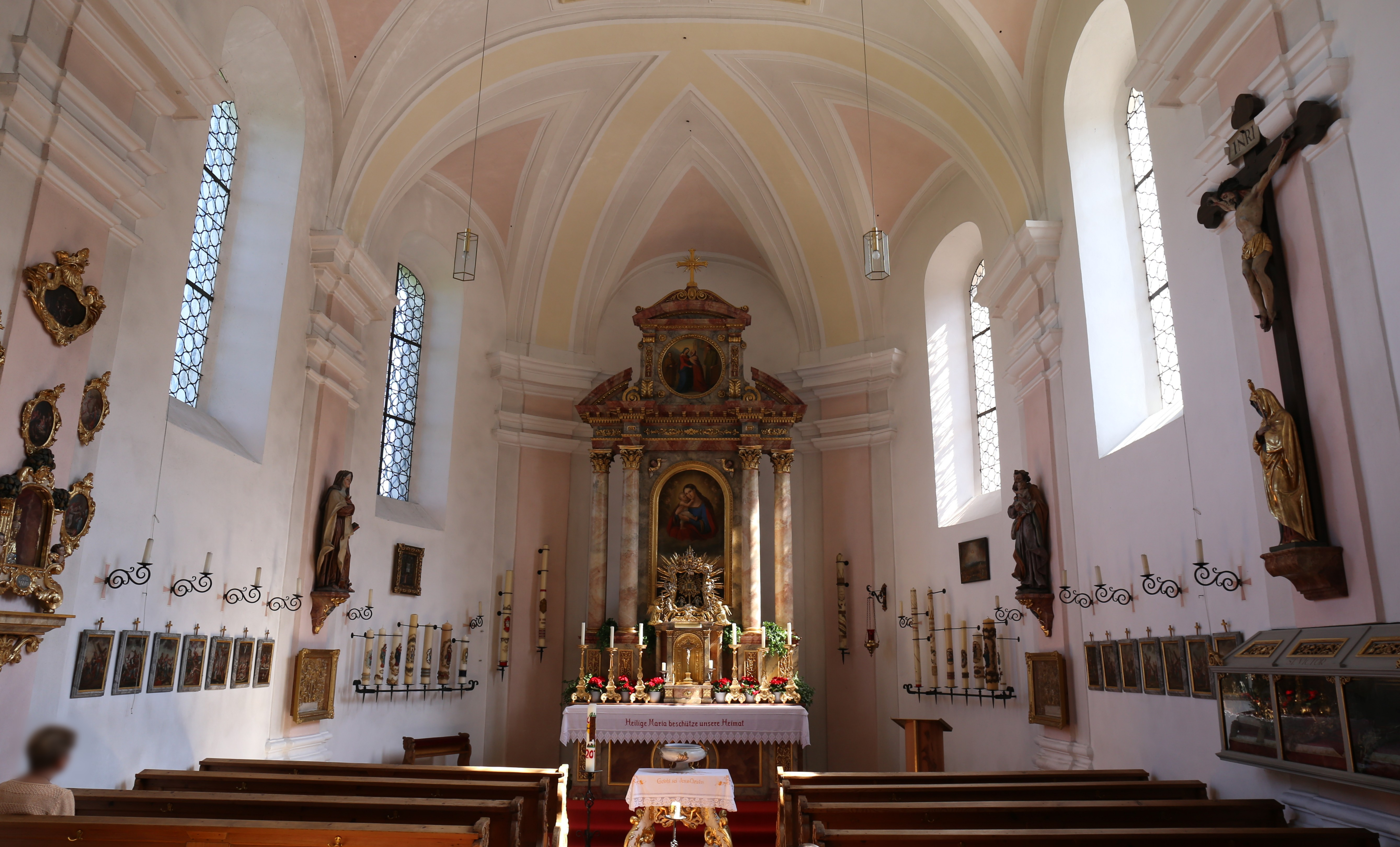 Mühlberg 3, Waging am See; Katholische Wallfahrtskirche Mariae Heimsuchung, barocker Saalbau mit Dachreiter, in zwei Abschnitten erbaut 1709–13; mit Ausstattung